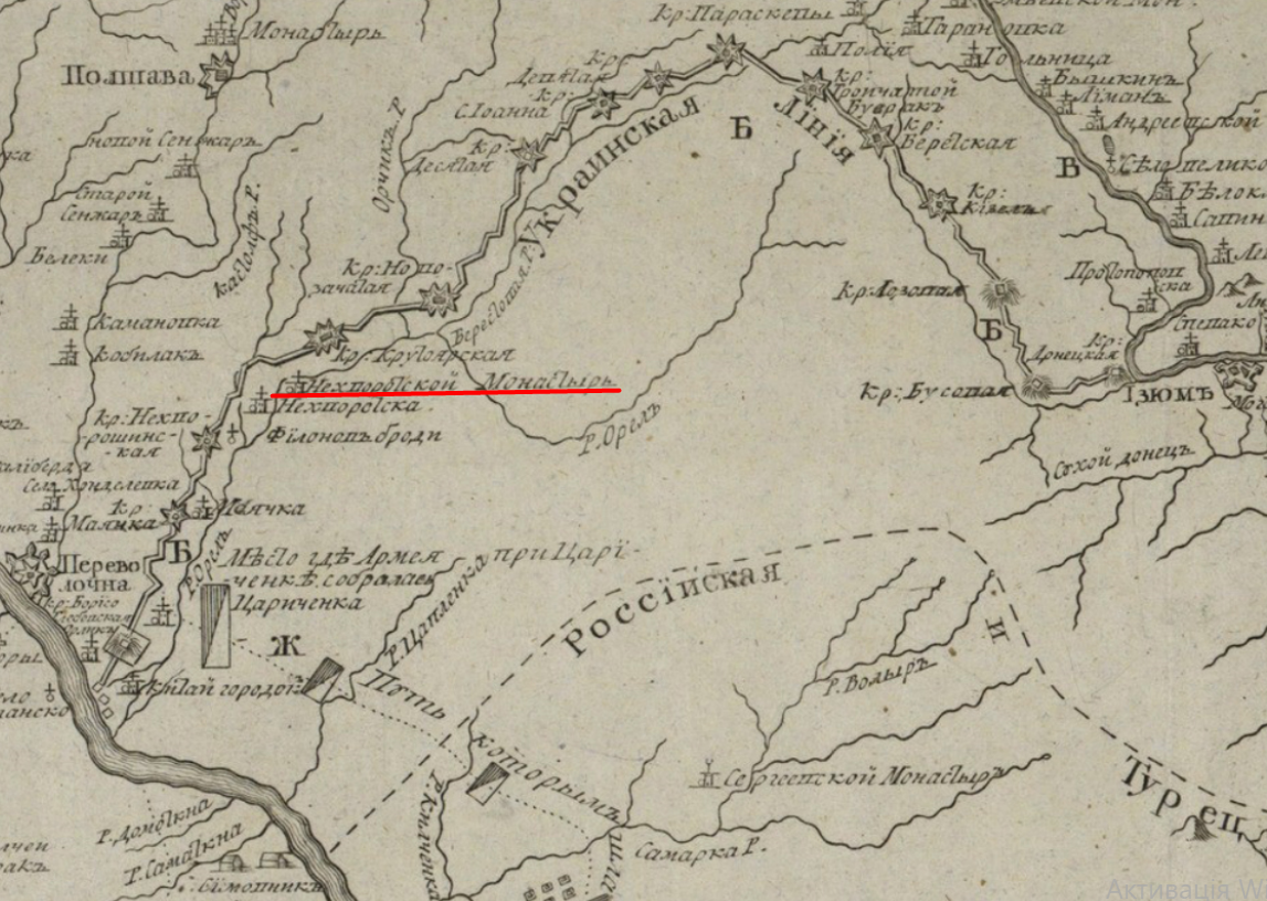 Фрагмент мапи "Карта военныхъ действий на Дону и Днепре ЕЯ ИМПЕРАТОРСКОГО ВЕЛИЧЕСТВА победоносныя Армеи 1736 году" на яку також зображується Нехворощанський монастир.